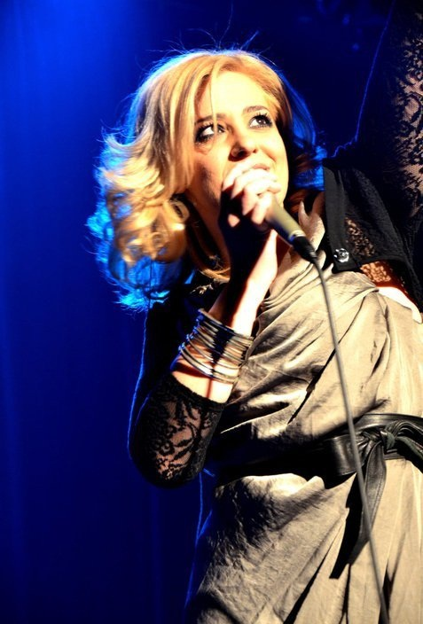 Η Νατάσσα Μποφίλιου στην τελευταία της συναυλία στο Μετρό, στις 17 Απριλίου του 2011.